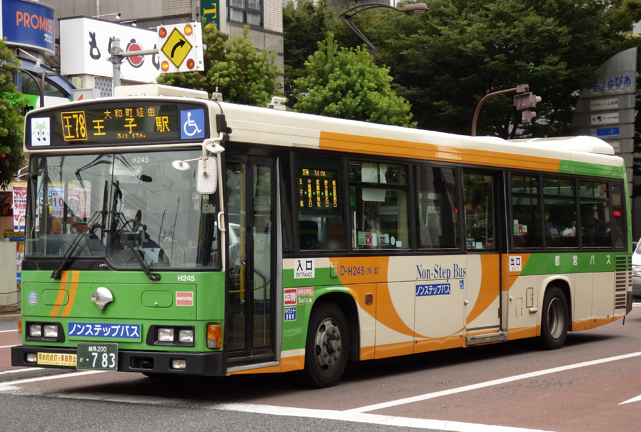 都営バス杉並支所のH245(日野・レインボーHR)